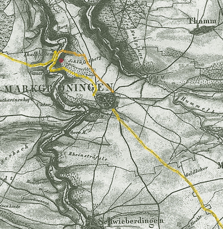 Potenzieller Streckenverlauf der 1480 verfügten B10-Umleitung über Grüningen (Markgröningen) und vorbei an der Schlüsselburg (roter Punkt)